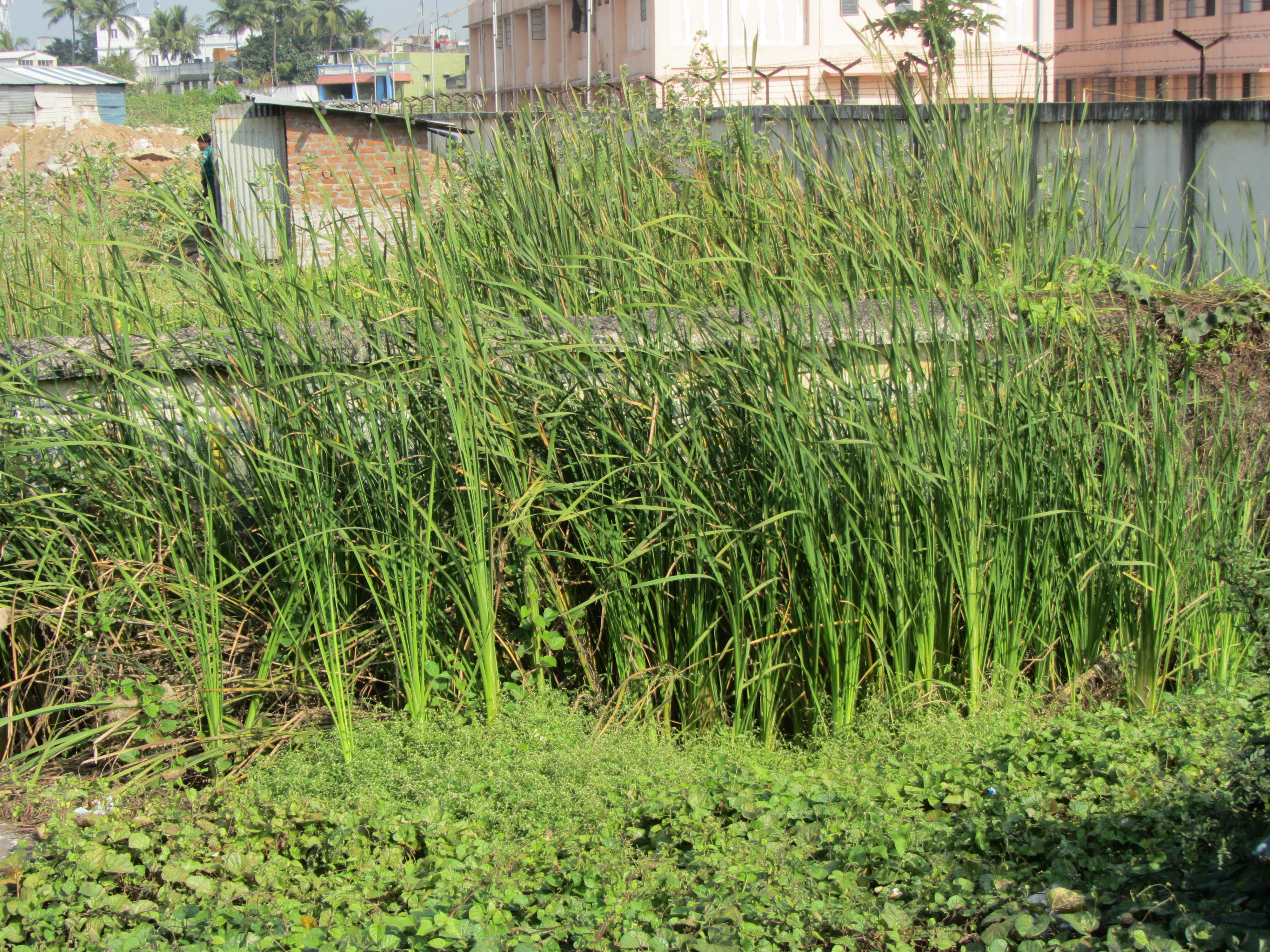 வேழம் என்னும் பேக்கரும்பு நீர்நிலைக் கரைகளில் தானே வளரும் புல்வகை. இதன் பூ வெண்மையாகக் கரும்புப் பூவைப் போலவே இருக்கும். - own shot.